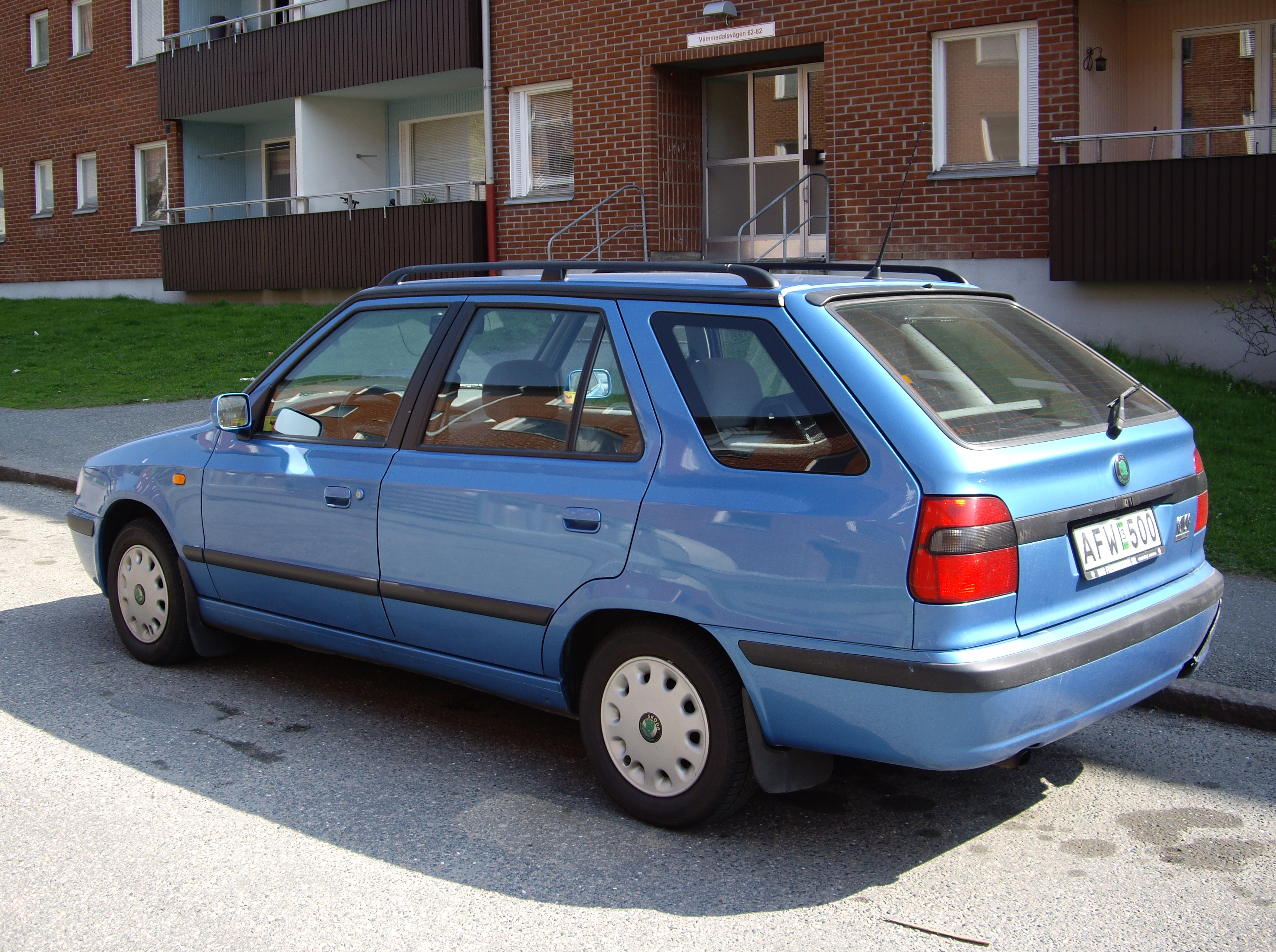 Skoda Felicia baksida